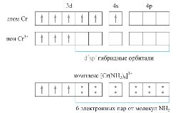 Схема образования донорно-акцепторных связей в комплексе Co(NH3)63+